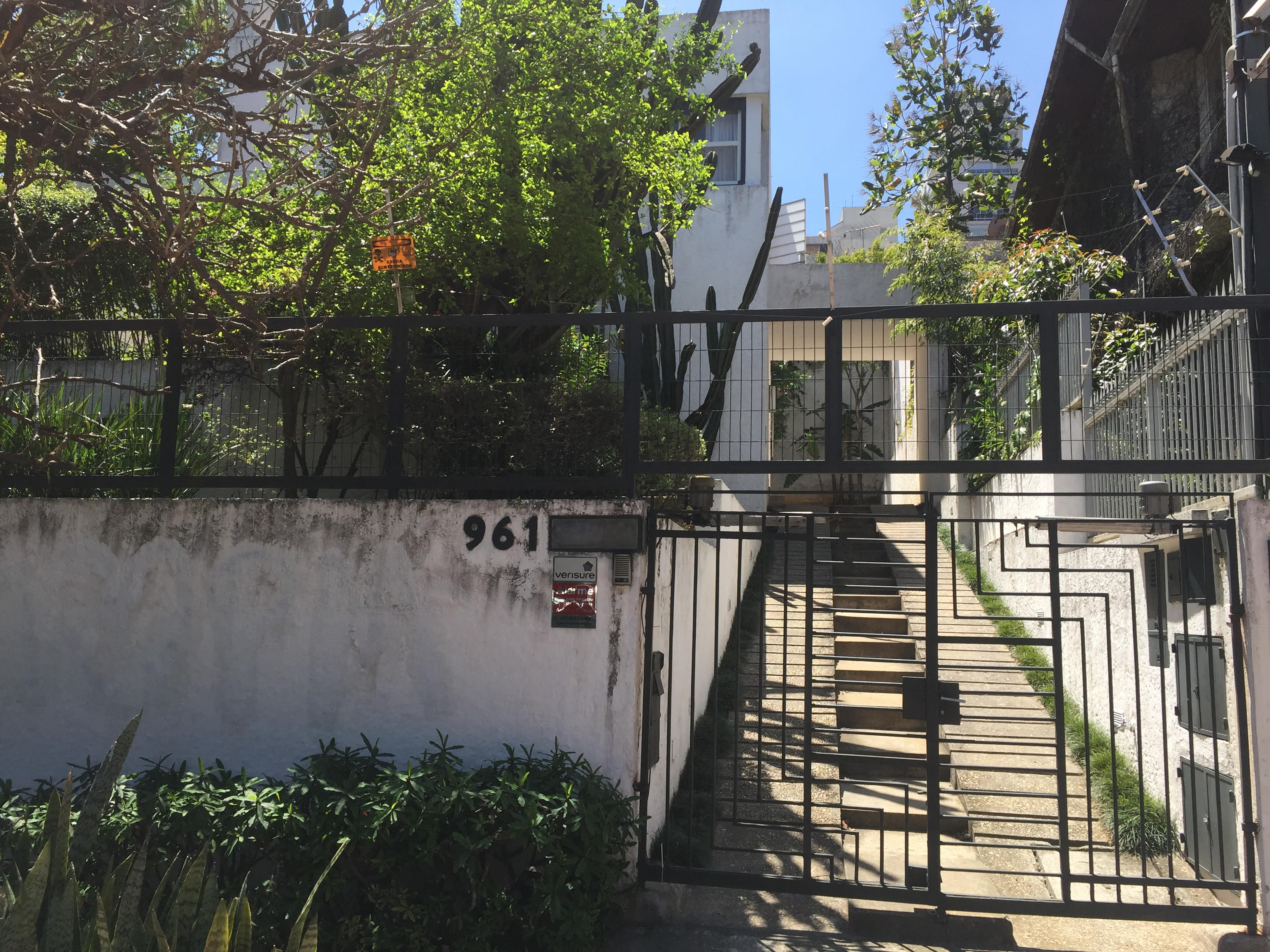 Fachada da Casa Modernista, na rua Itápolis, em São Paulo